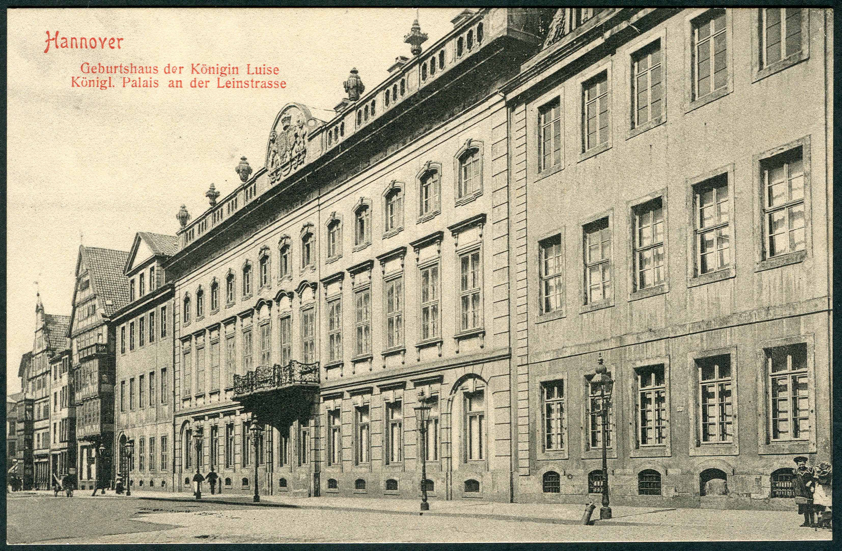 Blick um 1900 durch die Leinstraße in Hannover entlang des Alten Palais in Hannover in Richtung Hahnsche Buchhandlung und den Fachwerkhäusern am Holzmarkt. ... Dieses Dokument wurde freundlicherweise von Heralde Schmitt-Ulms zum Scannen geliehen, um es als Digitalisat bei Commons nachhaltig allen Menschen zu Bildungszwecken zur Verfügung zu stellen ...